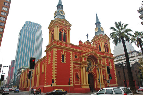 fachada